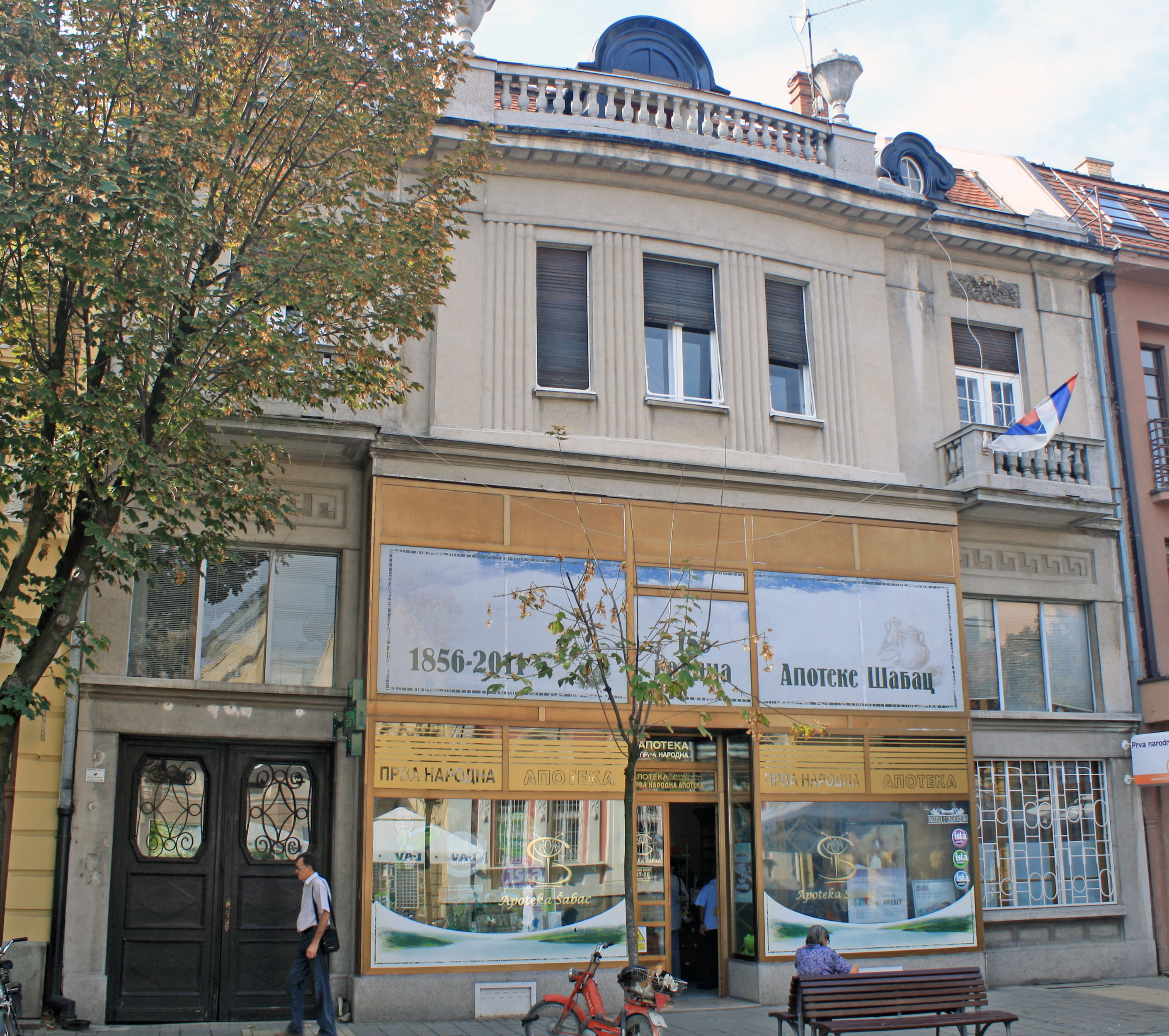 Зграда Прве народне апотеке у Шапцу, улица Господар Јевремова број 23.